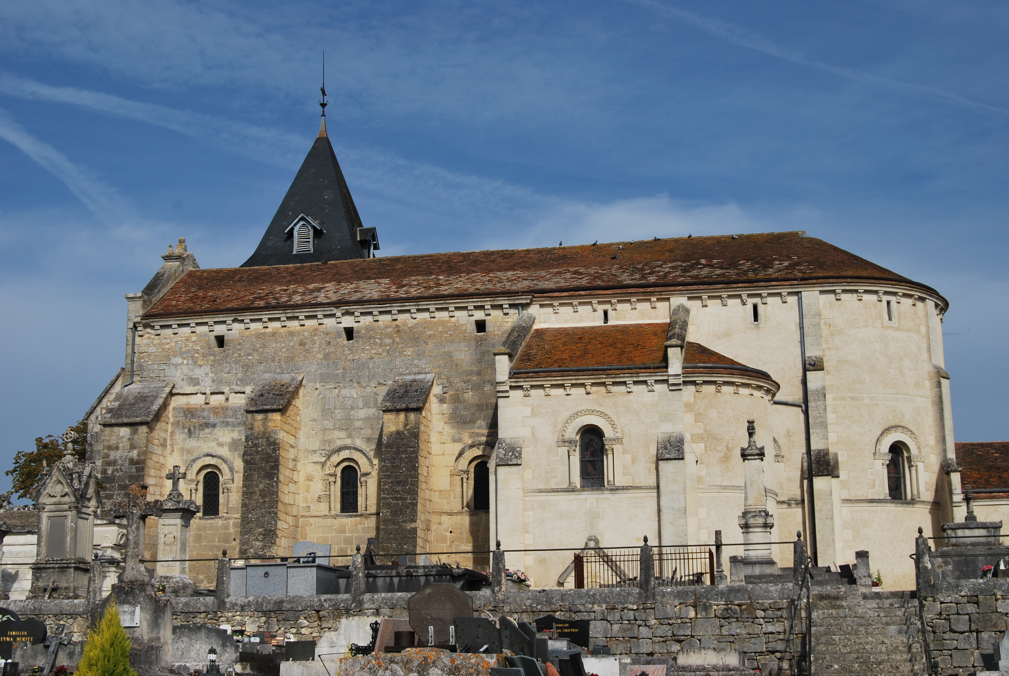 Église Saint-Pierre de Villegouge .